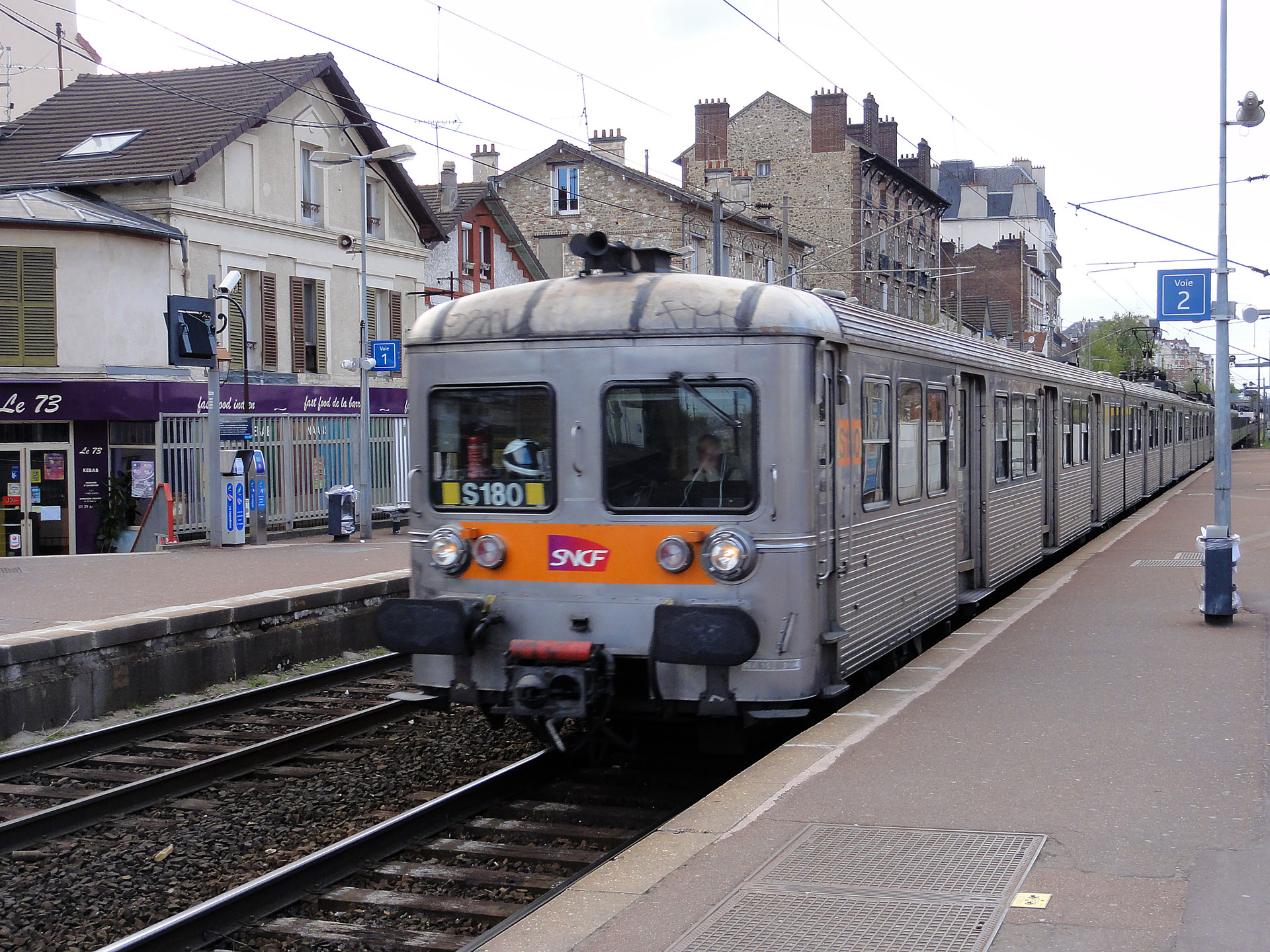 Rame Z 6100 traversant sans arrêt la gare de La Barre - Ormesson en direction de Paris-Nord, à Deuil-la-Barre, Val-d'Oise, France.